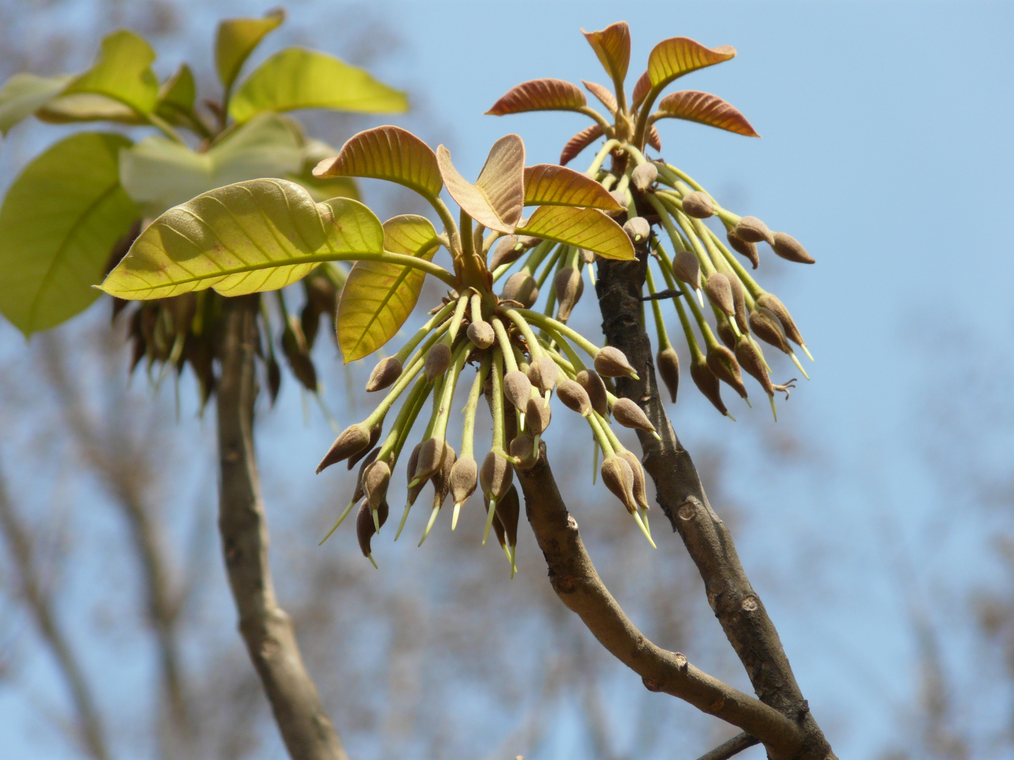 Sapotaceae (sapota family) » Madhuca longifolia var. latifolia MAH-dhuk-ah -- from Sankrit name of the plant, madhuka lon-jee-FOH-lee-uh -- meaning, long leaves lat-ee-FOH-lee-uh or lat-ih-FOH-lee-uh -- meaning, wide leaves commonly known as: honey tree, Indian Butter Tree, mahua • Assamese: মহুবা mahua • Bengali: মহুয়া mahuya • Gujarati: મહુડો mahudo • Hindi: गिलौंदा gilaunda, गुलू gulu, गुड़ gur, महुआ mahua, वानप्रस्थ vanprasth • Kannada: ಇಪ್ಪೆ ippe • Kashmiri: महोरा mahora, महवा मोवा mahwa-mova • Konkani: मोहवा mohwa • Malayalam: ഇലിപ്പ ilippa • Marathi: म्होंव mhomva, मोह or मोहा moha • Nepalese: मौवा mauwa, महुवा mahuwa • Pali: मधुकम madhukam • Prakrit: महुअं mahuam, महुओ mahuo • Sanskrit: मधूक madhuca, मधूकम् madhucam, मोह moha, वानप्रस्थः vānaprasthh • Tamil: காட்டிருப்பை kattiruppai, இலுப்பை illupei • Telugu: ఇప్ప ippa, మధూకము or మధుకము madhukamu • Urdu: گلوندا gilaunda, gul-chikan, گلو gulu, گڙ gur, مہوا mahua Native to: India References: Flowers of India • NPGS / GRIN • Wikipedia • eFlora • DDSA